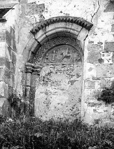 Le portail nord bouché, état avant 1897, peu avant la restauration.